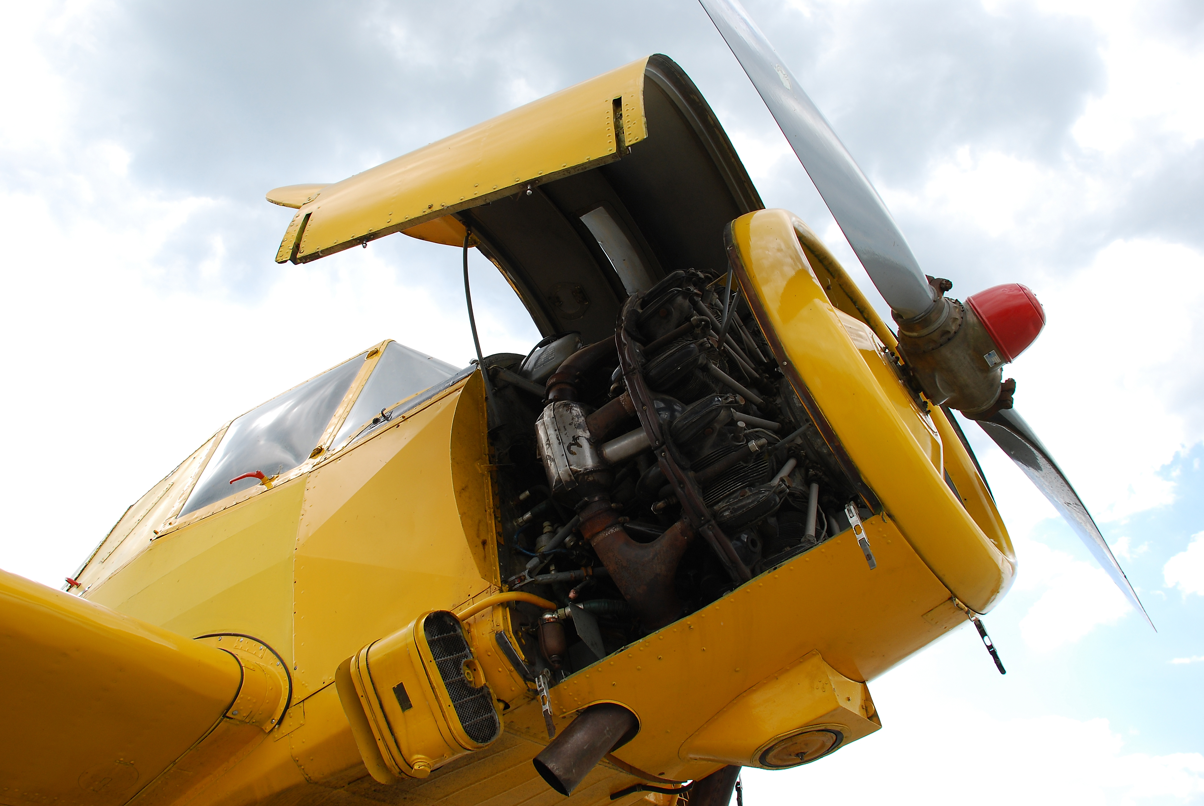 imx00000021